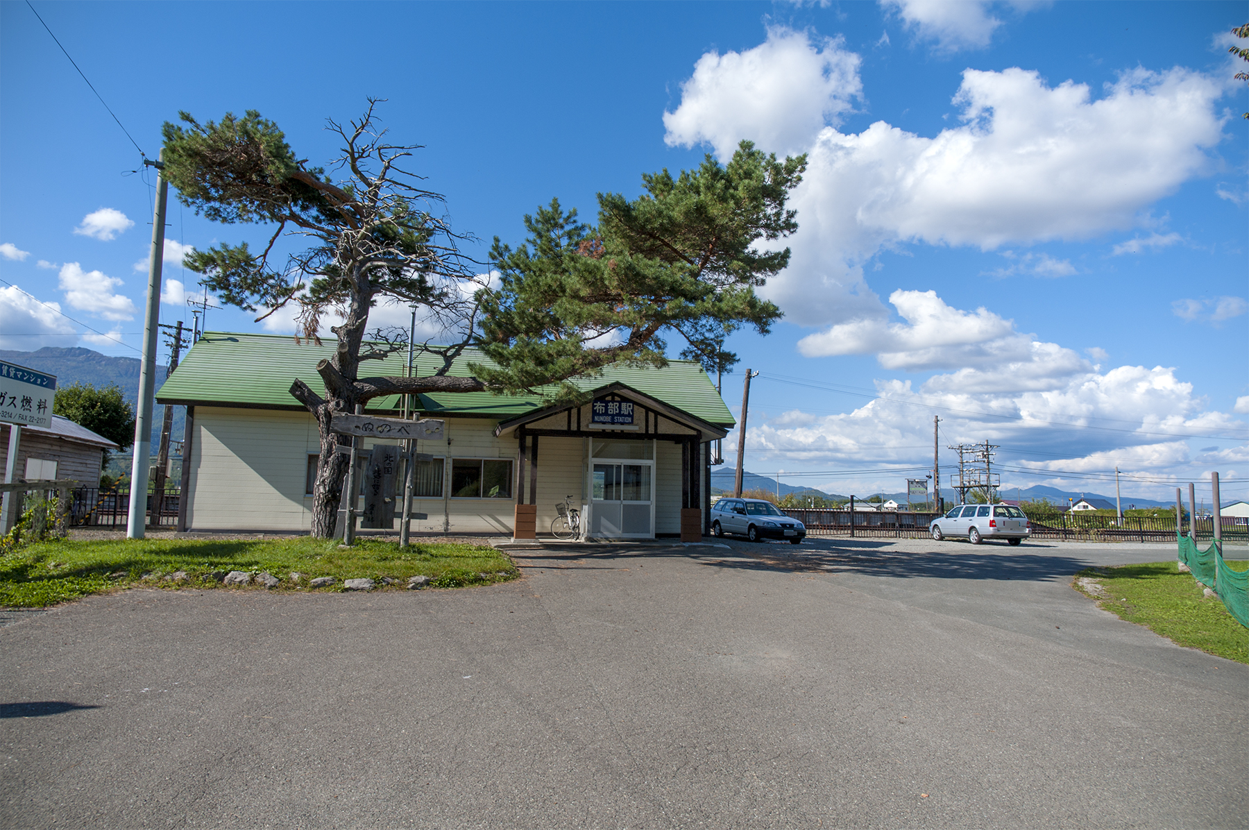 北海道旅客鉄道株式会社根室本線布部駅